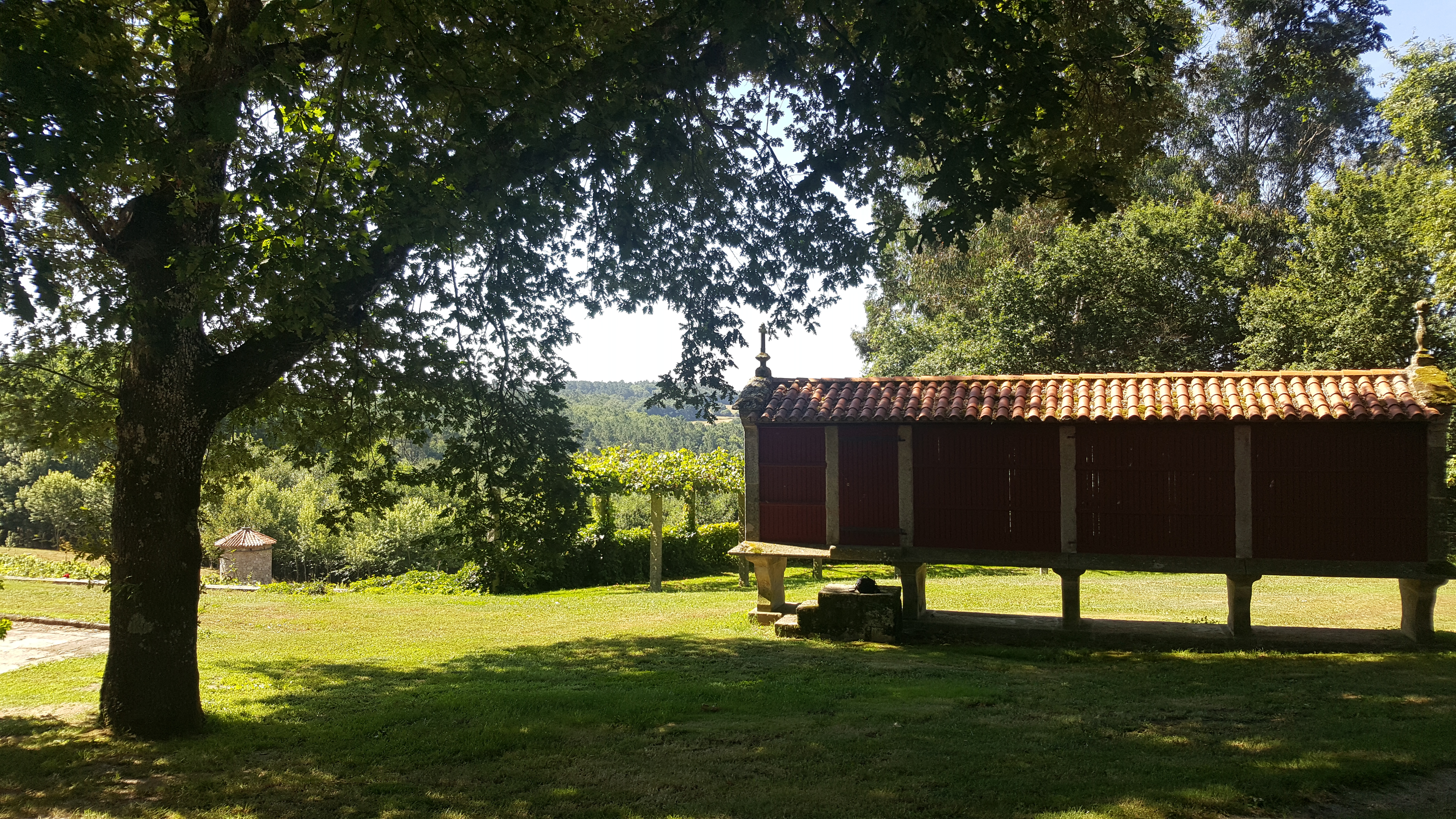 Vistas do Pazo de Arxeriz. Horreo e Pombal.